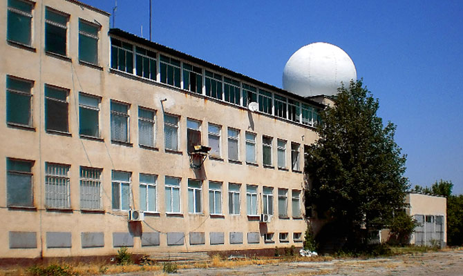 Полигон за борба с градушките в Бърдарски геран през 2015